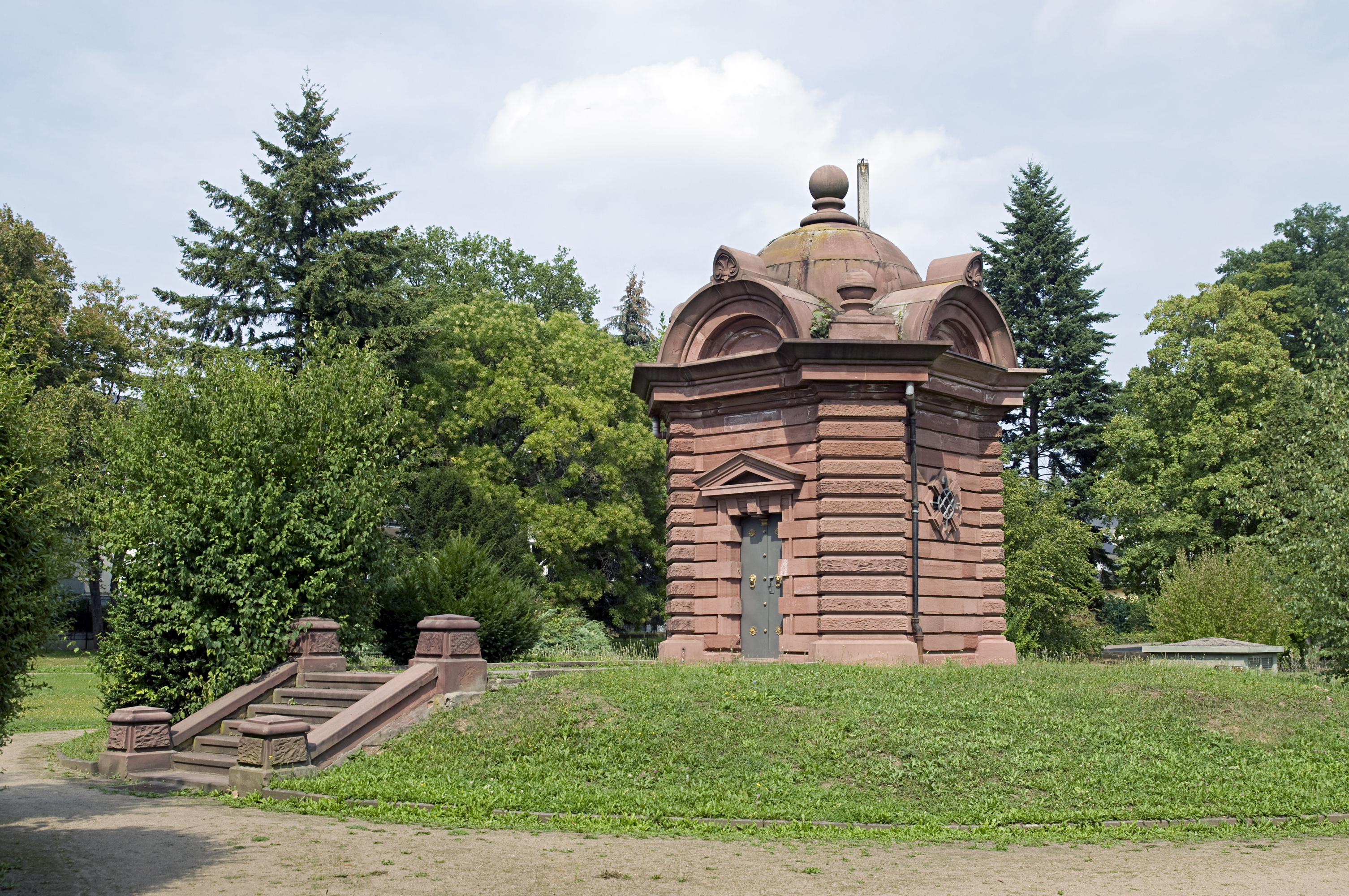 Wasserpark Frankfurt am Main Pumpwerk